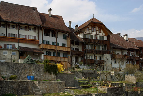 Wiedlisbach von Süden her gesehen